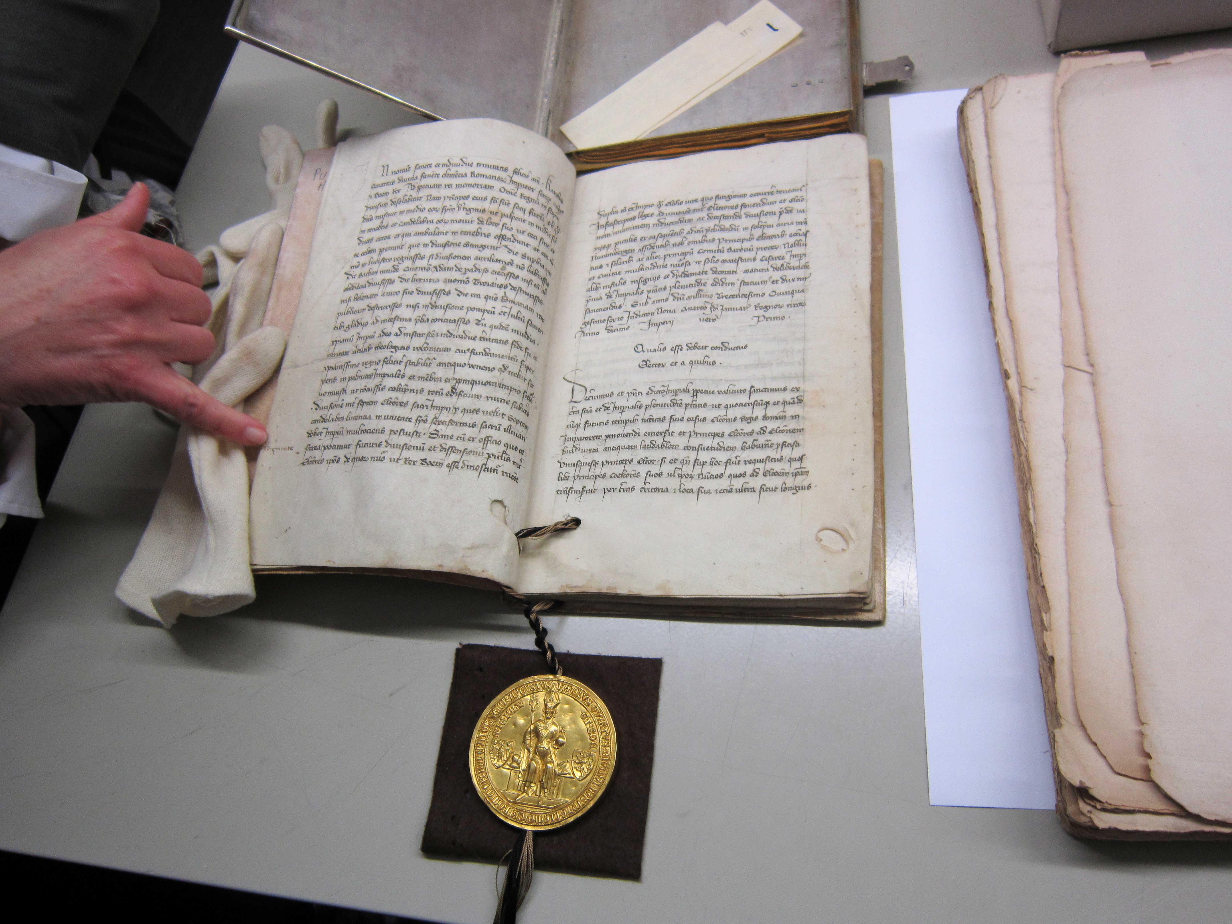 Vollständige Ansicht des Trierer Exemplars der Goldenen Bulle im Hauptstaatsarchiv Stuttgart